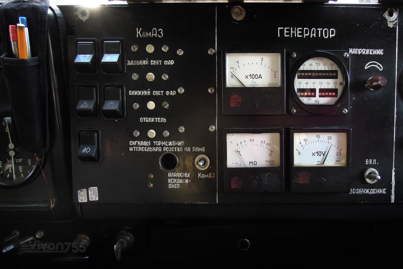 Средняя часть приборной панели автомобильного кондиционера АМ-0,4-М1 с приборами контроля генератора